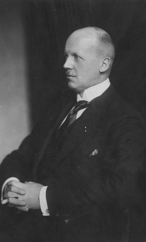 Hans Heinrich Lammers Dr. Lammers, Oberregierungsrat. 18. April 1921 [Porträt Dr. Hans Heinrich Lammers im Sitzen] Abgebildete Personen: Lammers, Hans-Heinrich Dr.: Reichsminister, Chef der Reichskanzlei, Deutschland